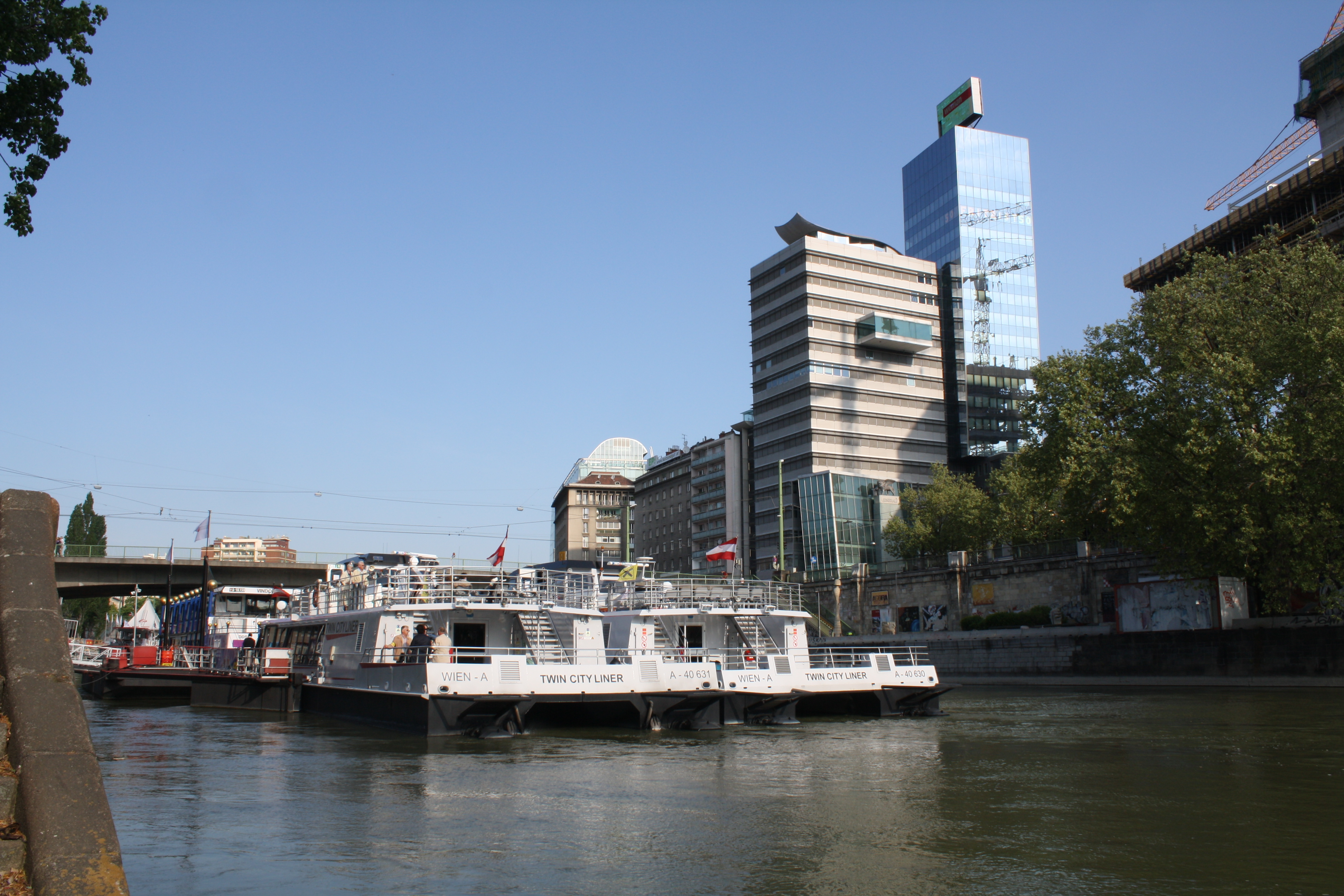 Der Twin City Liner im Donaukanal von Wien